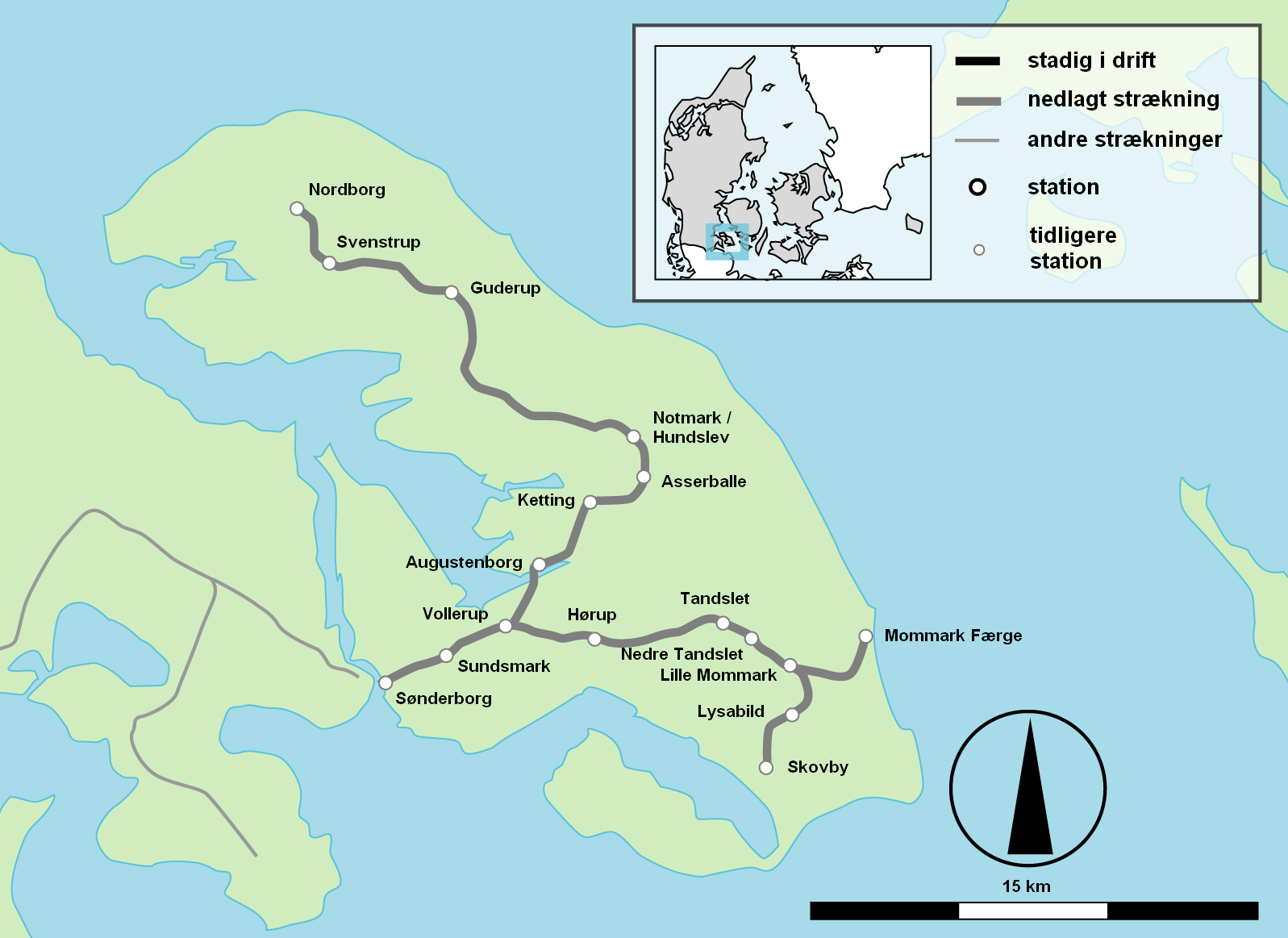 Amtsbanerne på Als